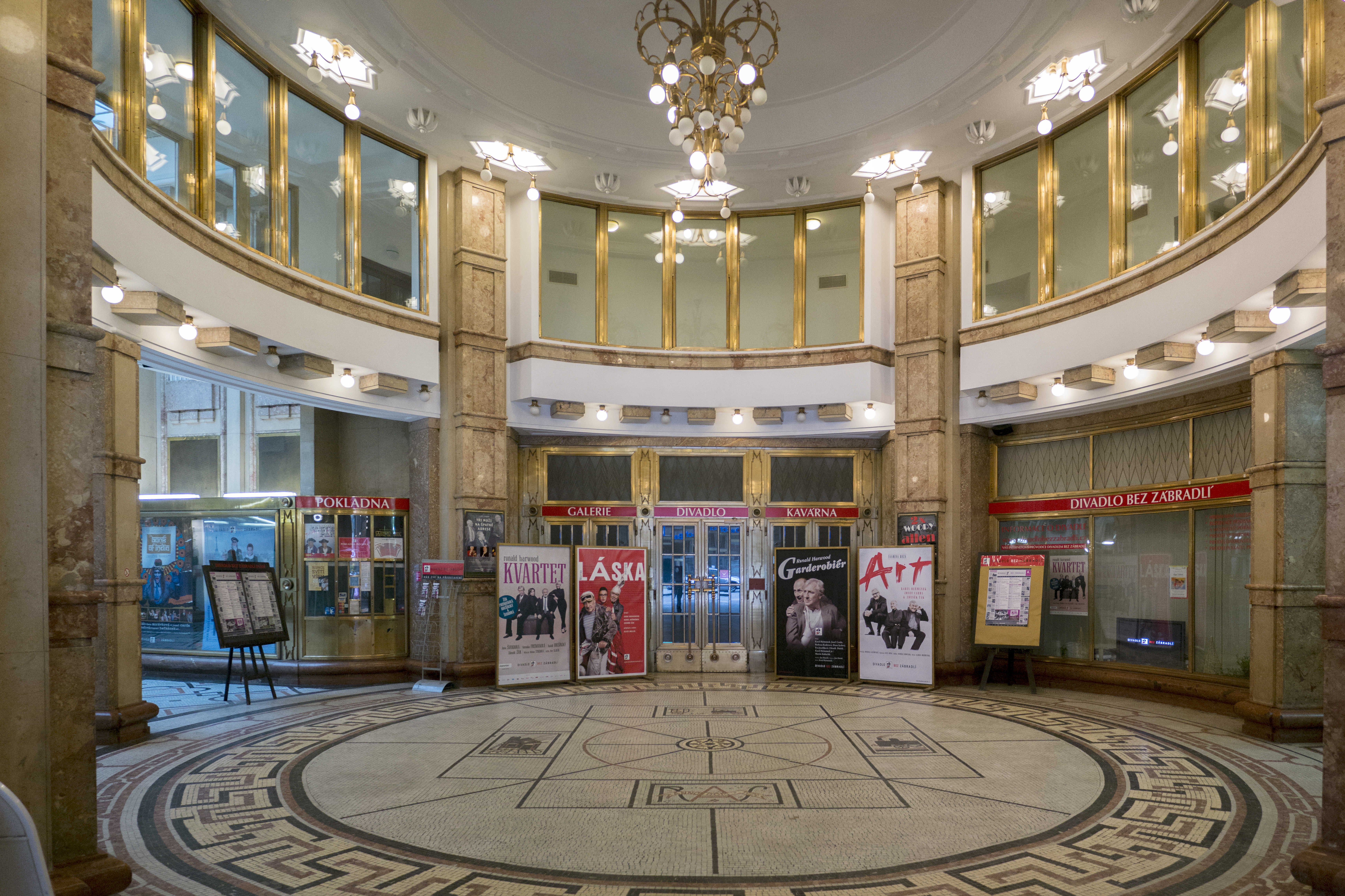 Prag Kubismus Adria Palast